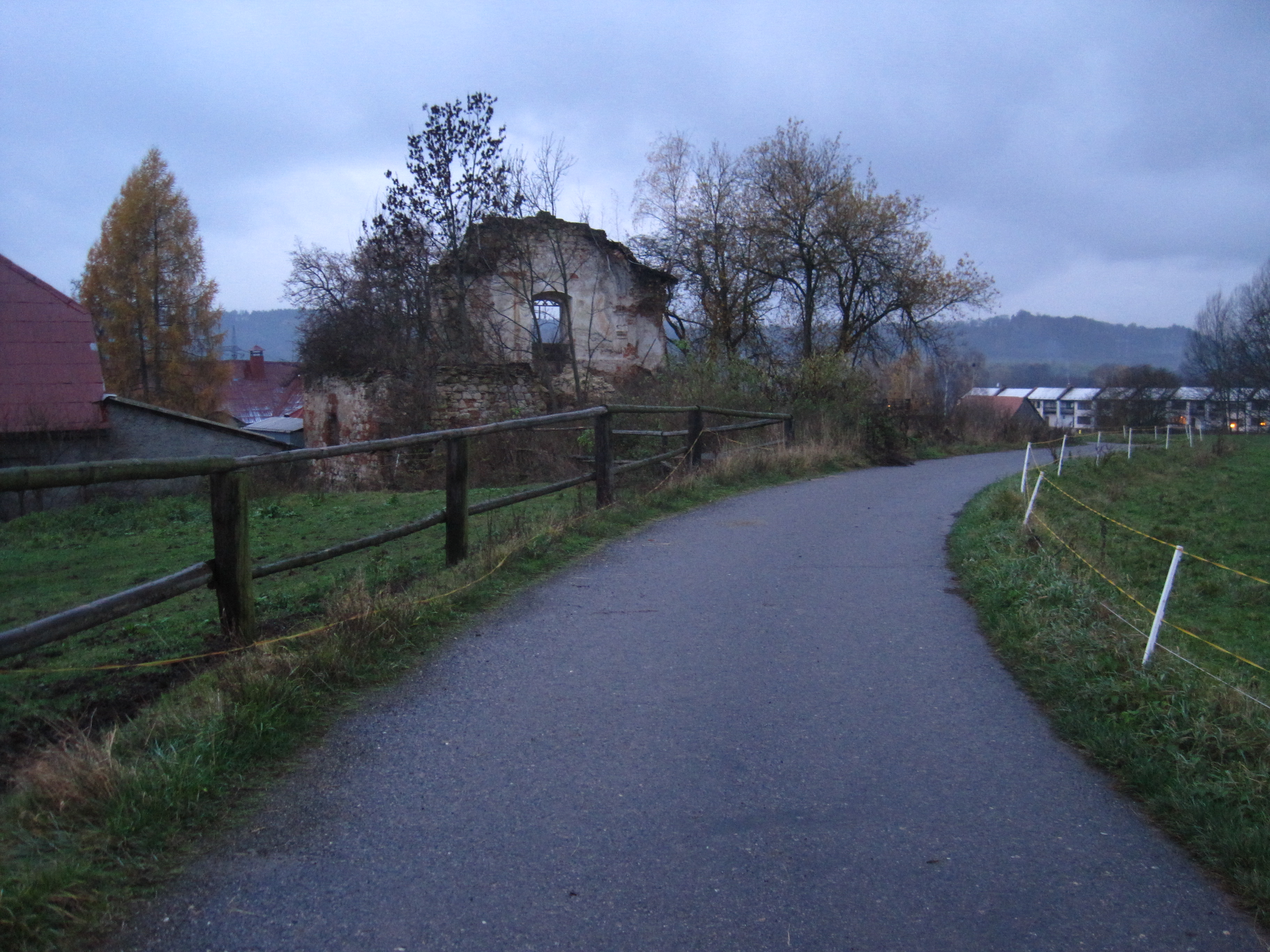 Kaple Anděla Strážce, parcely st. 2 a 4, Jílové (Hodkovice nad Mohelkou).